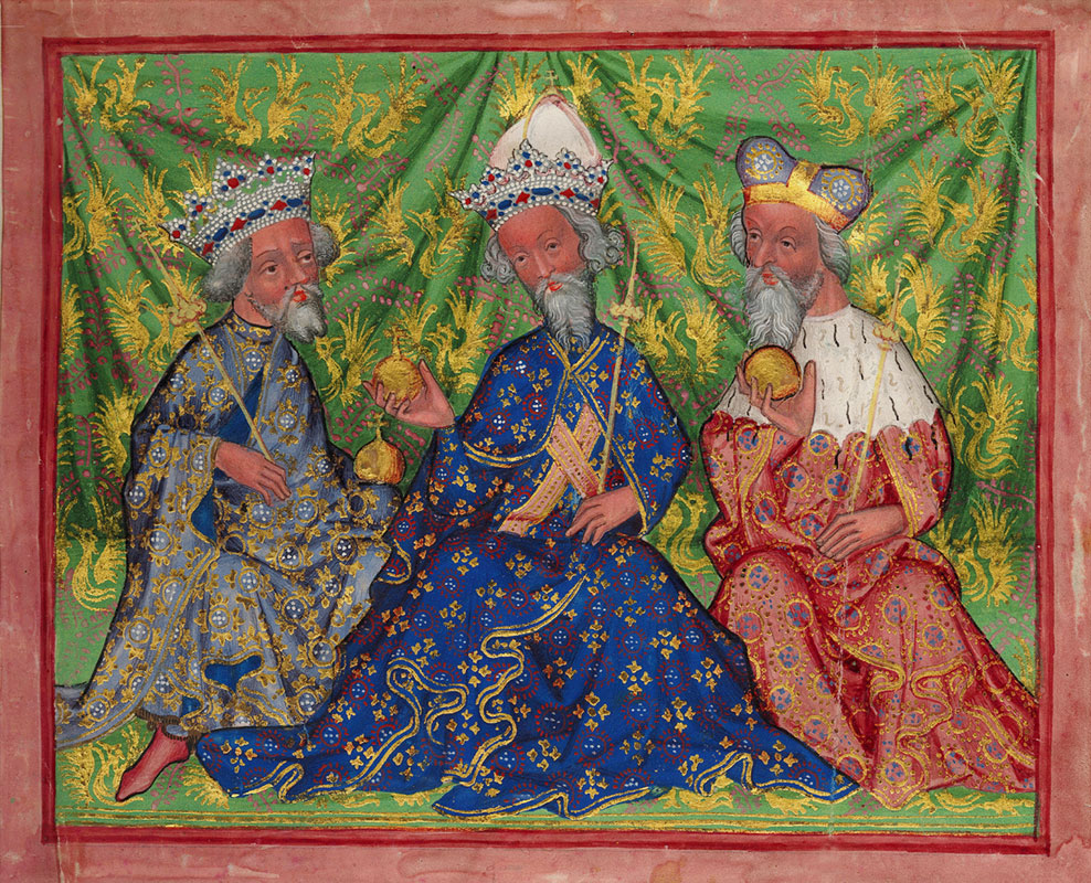 Václav IV., Karel IV. a Jošt Moravský